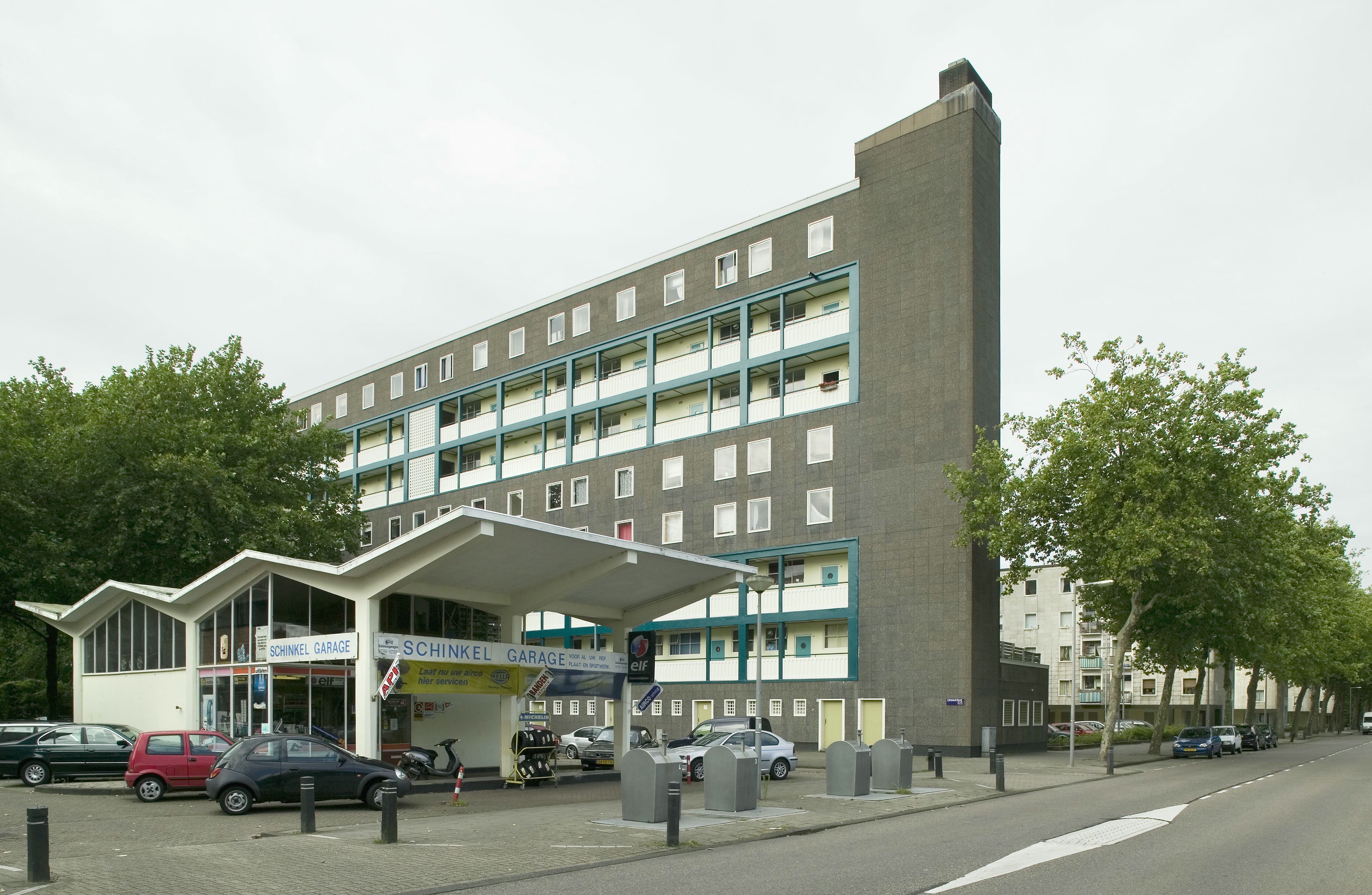 Schinkel Garage.Sloterhof: Overzicht gedeelte woonwijk (opmerking: Gefotografeerd voor Monumenten van Herrezen Nederland).